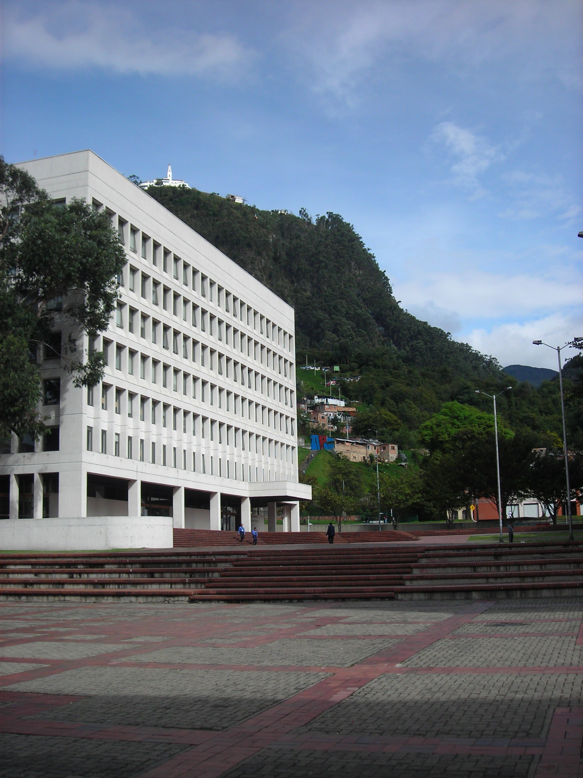 Módulo 16 de la Universidad Jorge Tadeo Lozano de Bogotá. Calle Vientitrés con carrera Tercera.